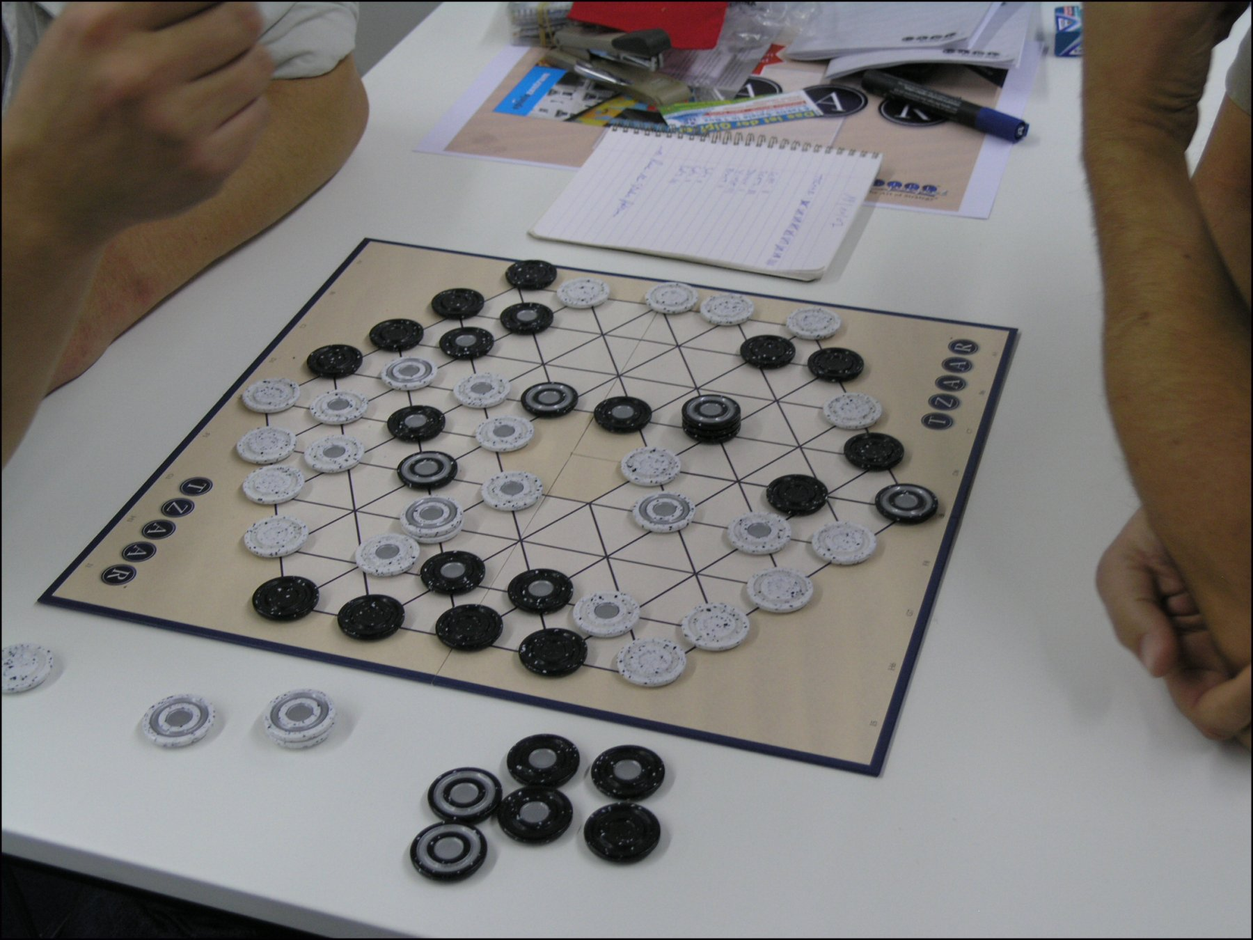 Tzaar (Essen Spiel'07)